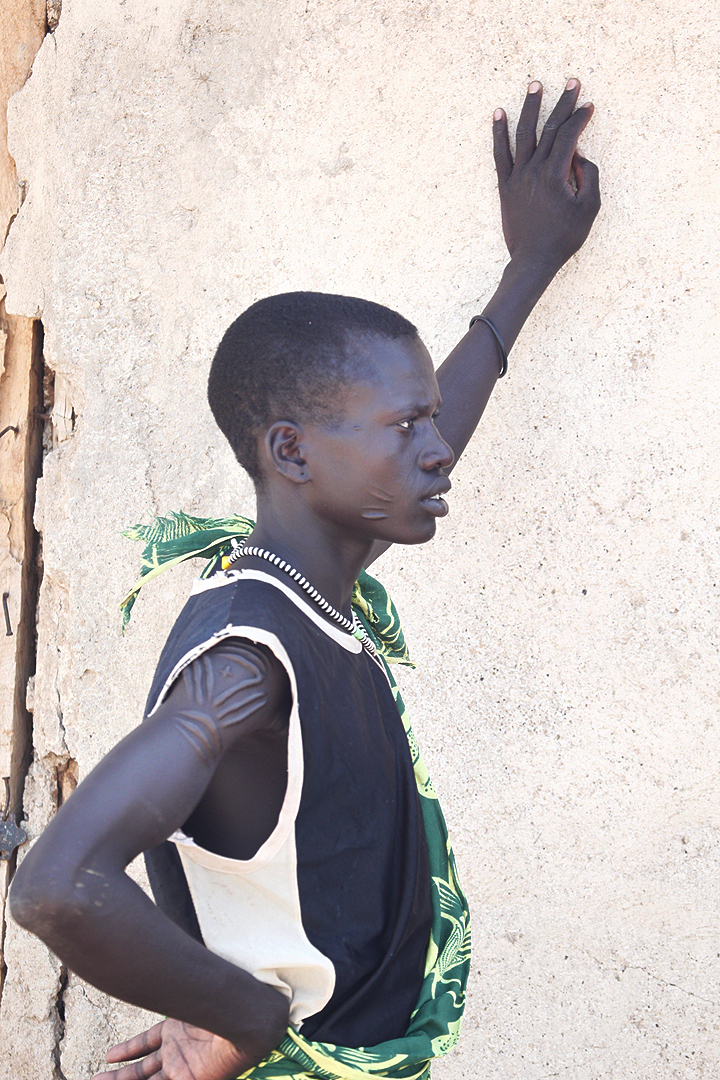 Young Toposa man in South Sudan